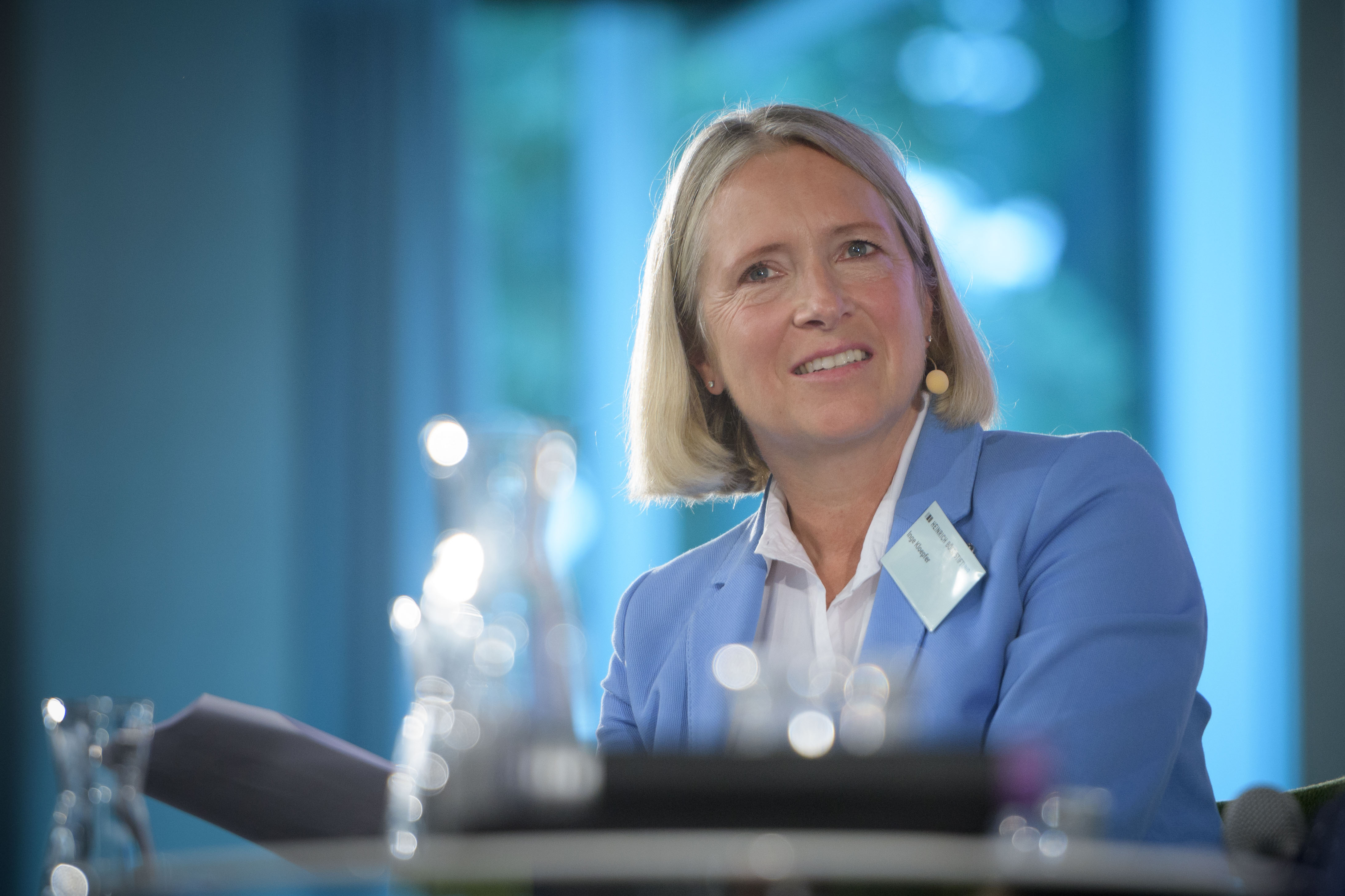 Heinrich-Böll-Stiftung: Baustelle Bildung – Befähigung für die digitale Zukunft - #digiZuk, Moderation: Inge Kloepfer (Publizistin, Autorin, FAS) Foto: stephan-roehl.de